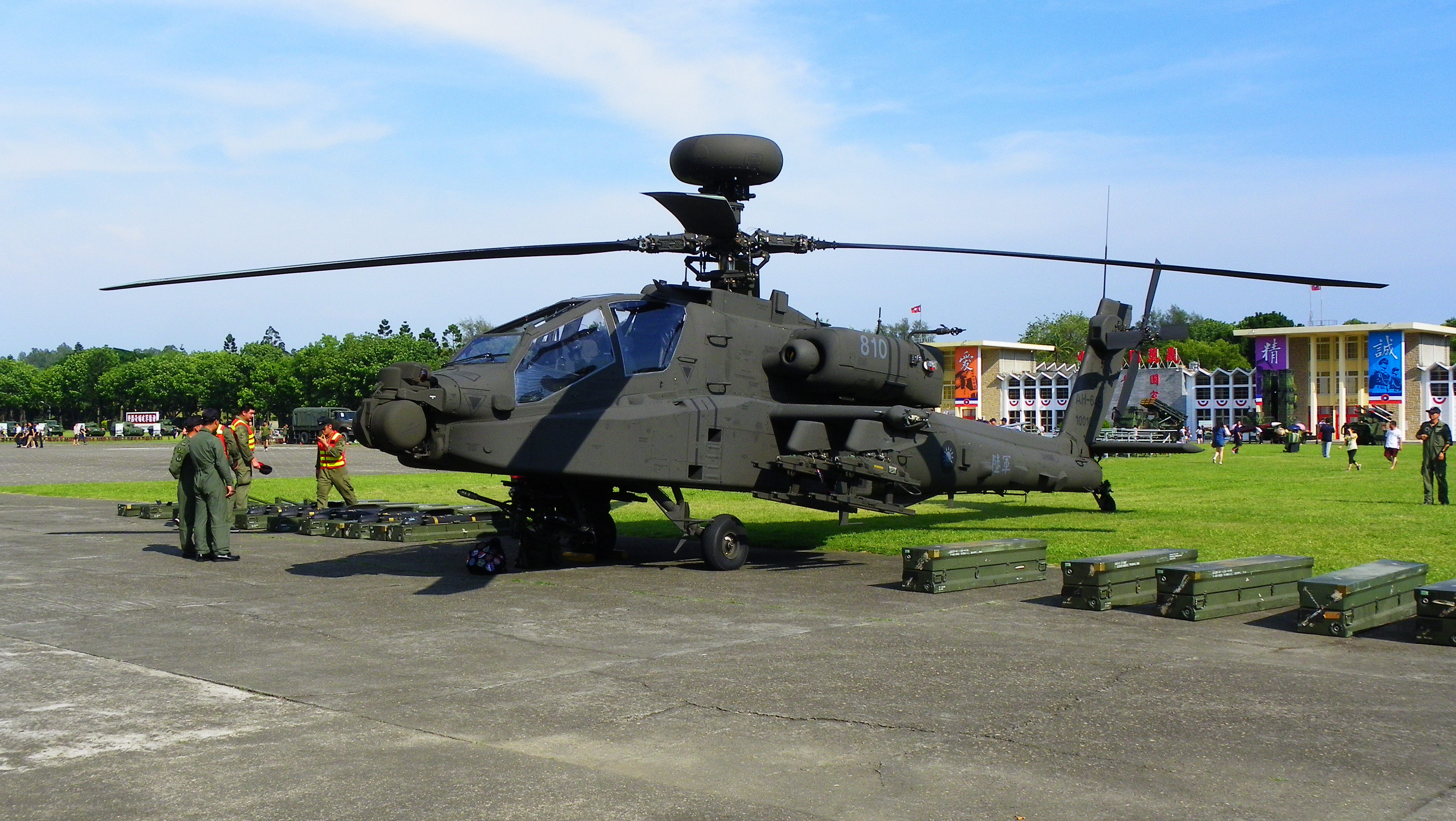 2014年陸軍官校營區開放活動尾聲，彈藥卸載作業完成的AH-64E 810。